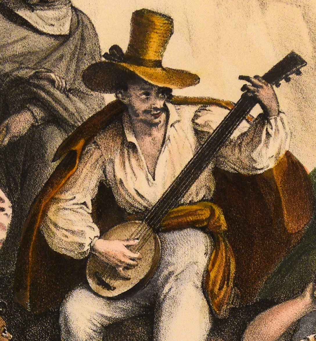 Detalhe da gravura "Costumes de São Paulo" de Johann Moritz Rugendas (1802-1858).